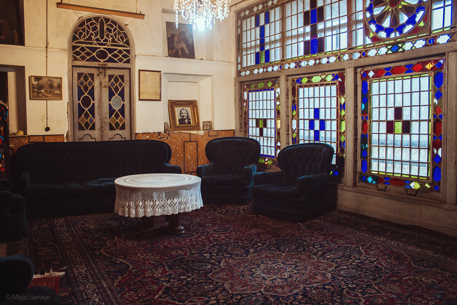 خانه منجم‌باشی